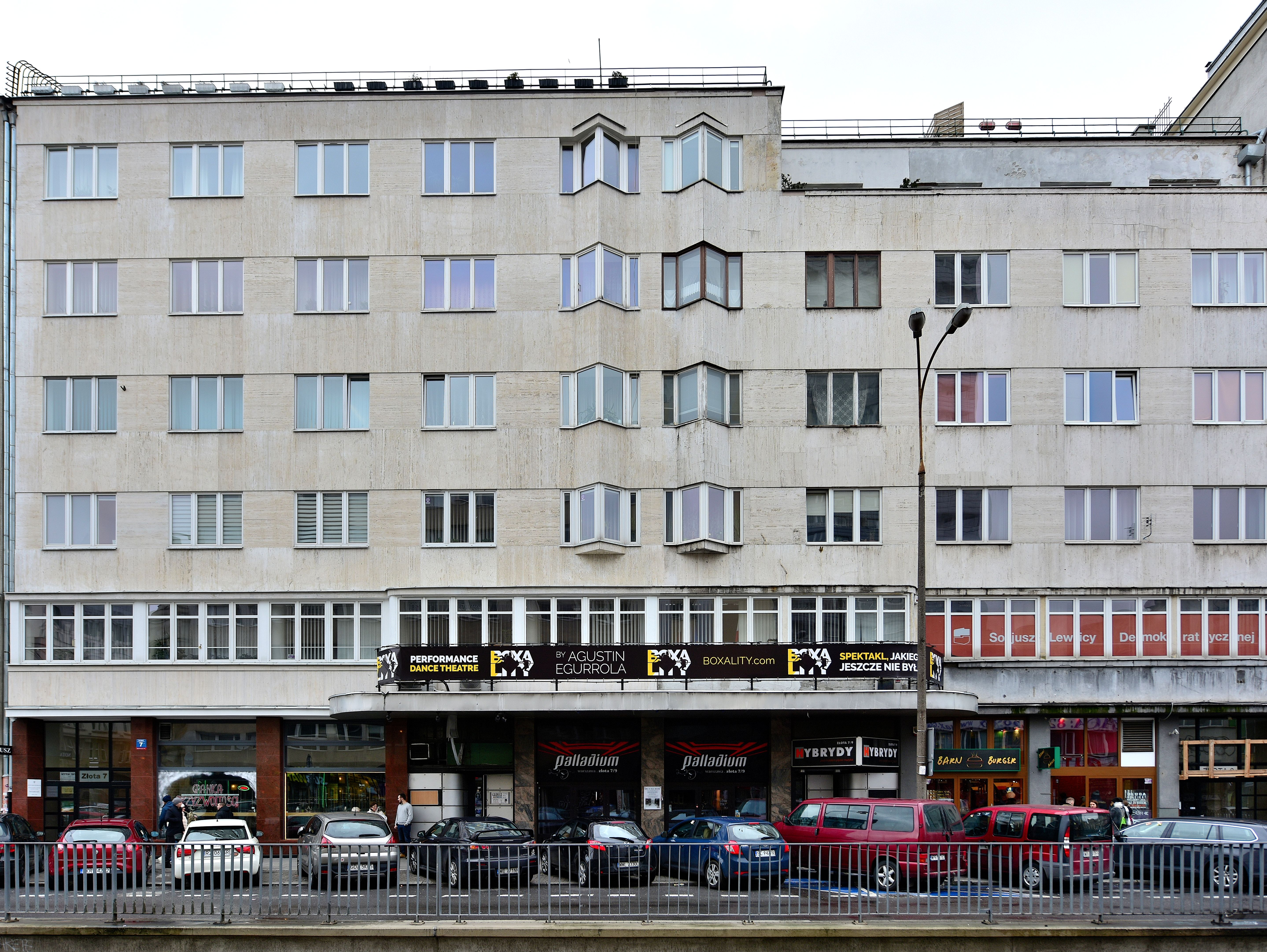 Budynek Assicurazioni Generali Trieste przy ul. Złotej 7/9